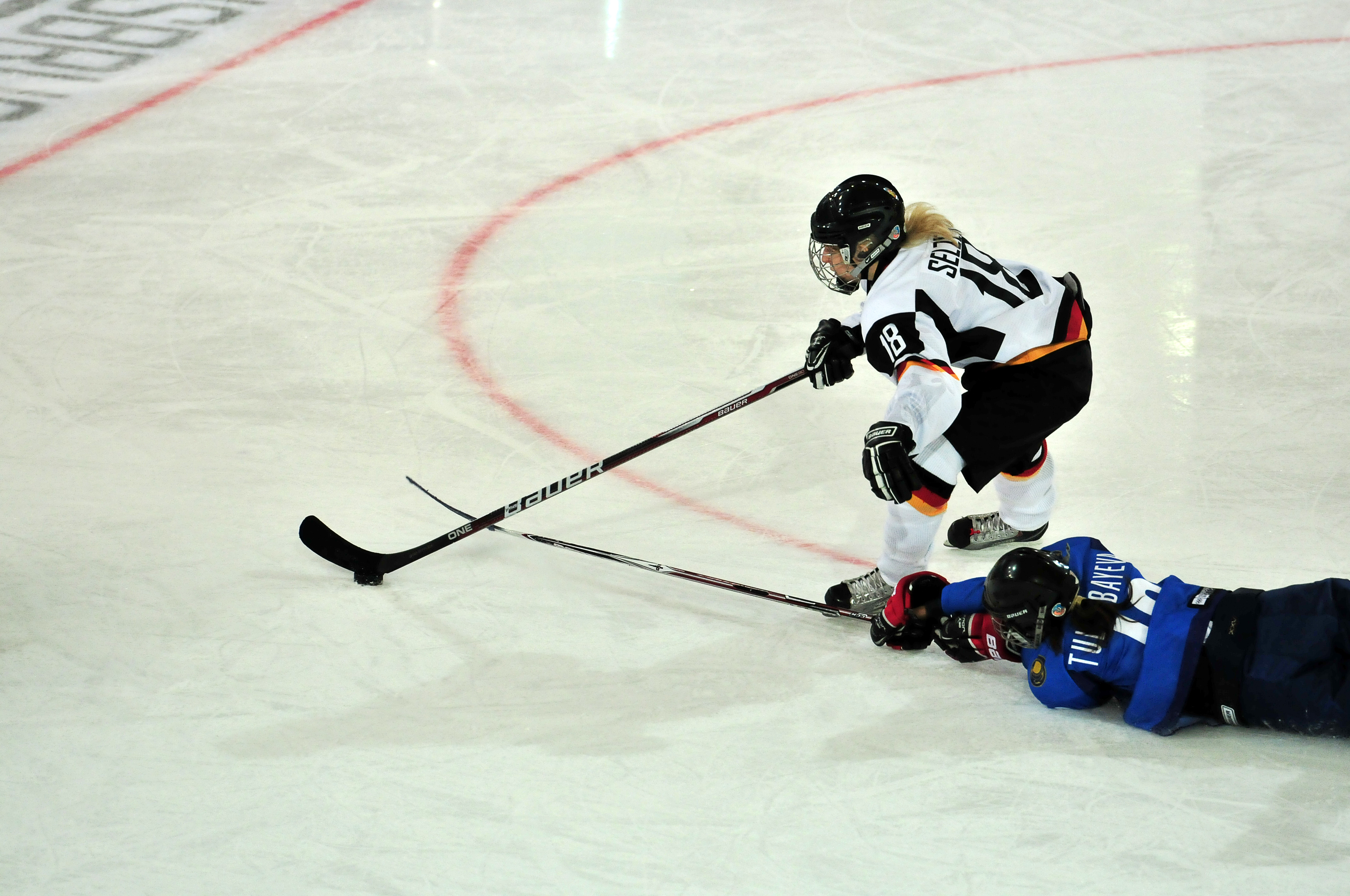 1. Jugendolympiade 2012 Innsbruck